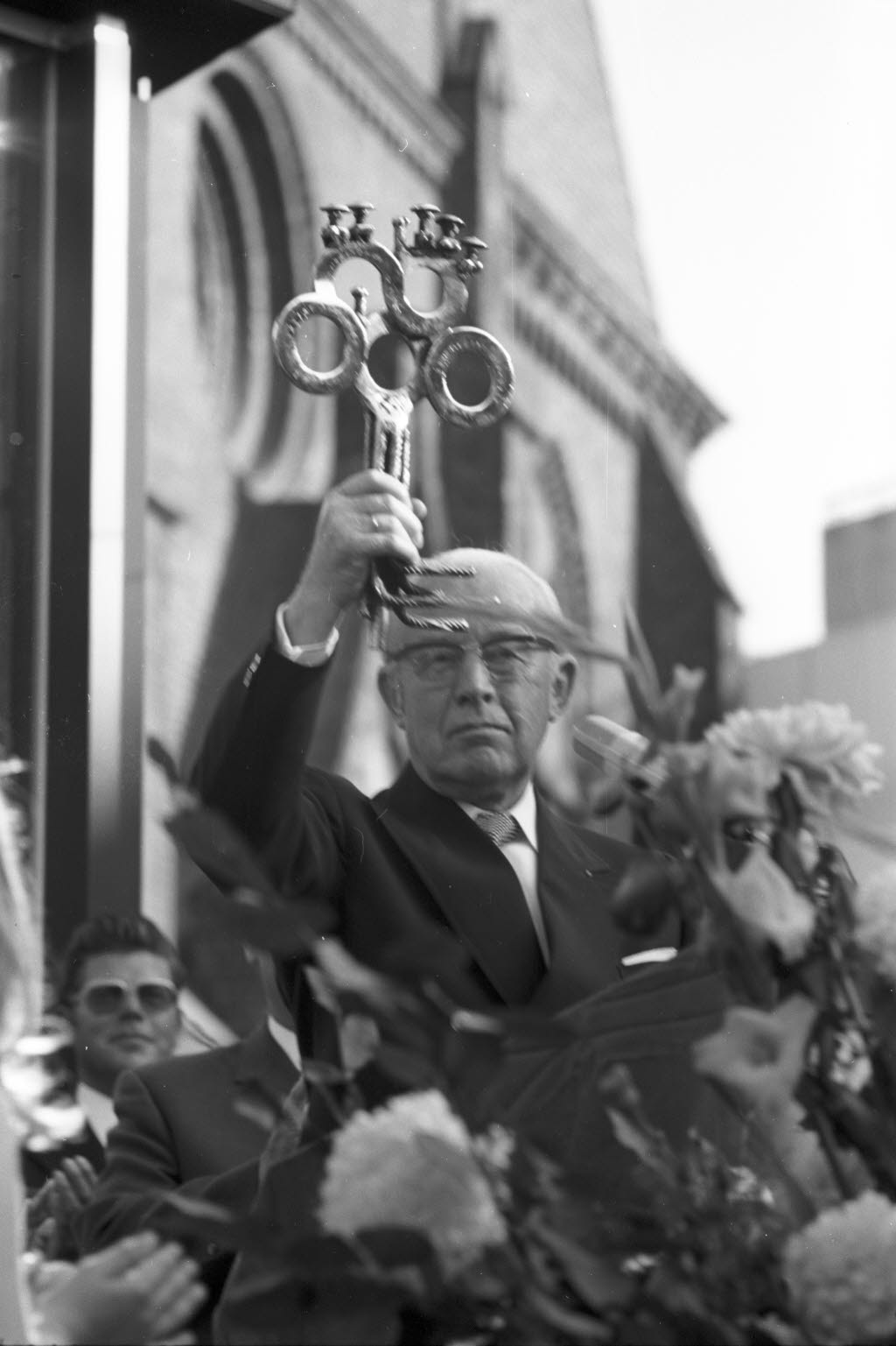 Architekt Dipl.-Ing. Wilhelm Neveling hält den vom Bildhauer Sauk gestalteten Marktschlüssel hoch.